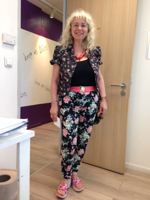 תמונת גוף